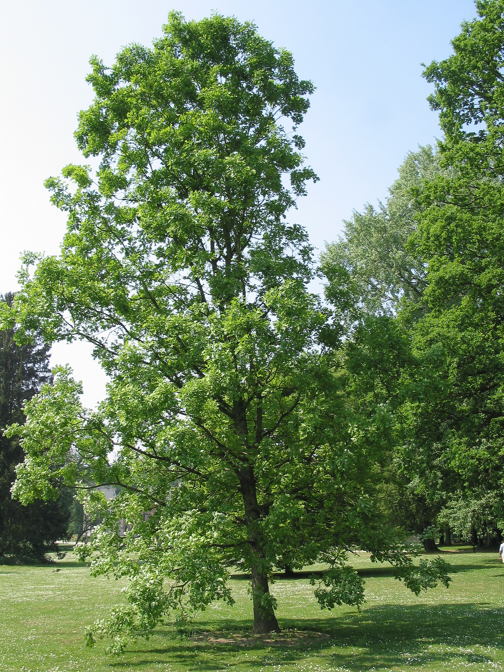 Chêne à gros fruits (Quercus macrocarpa)